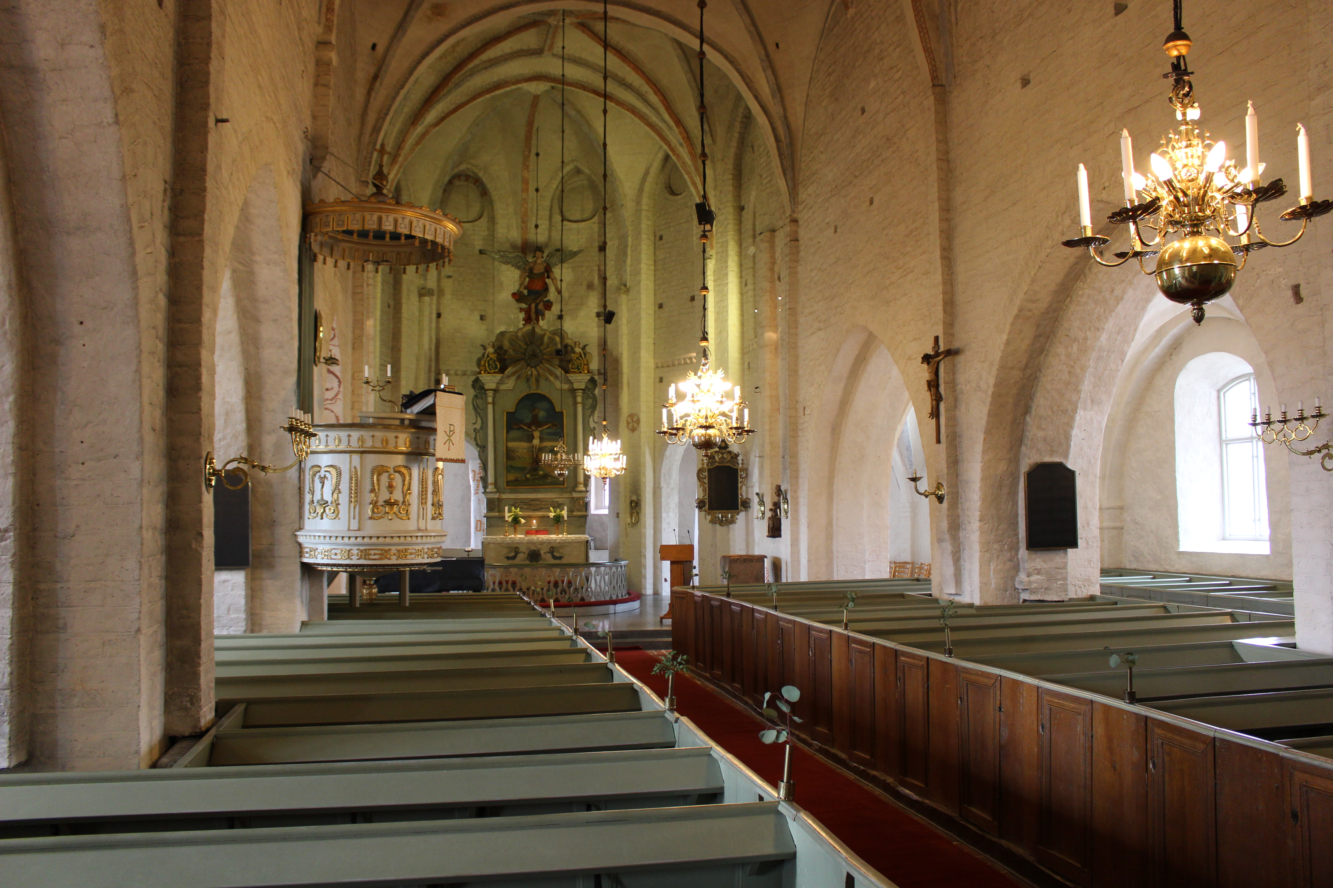 Kyrkorummets mittskepp.